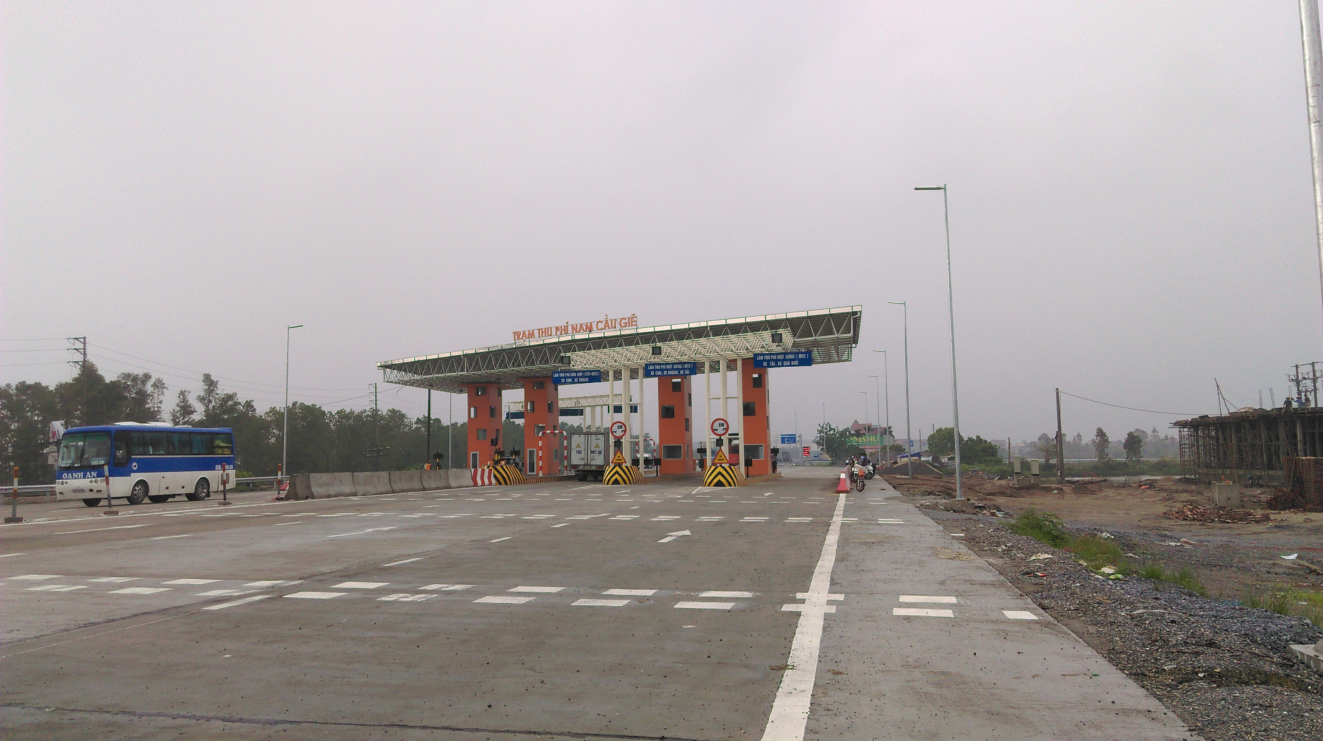 Trạm Thu phí Nam Cầu Giẽ, Duy Tiên, Hà Nam